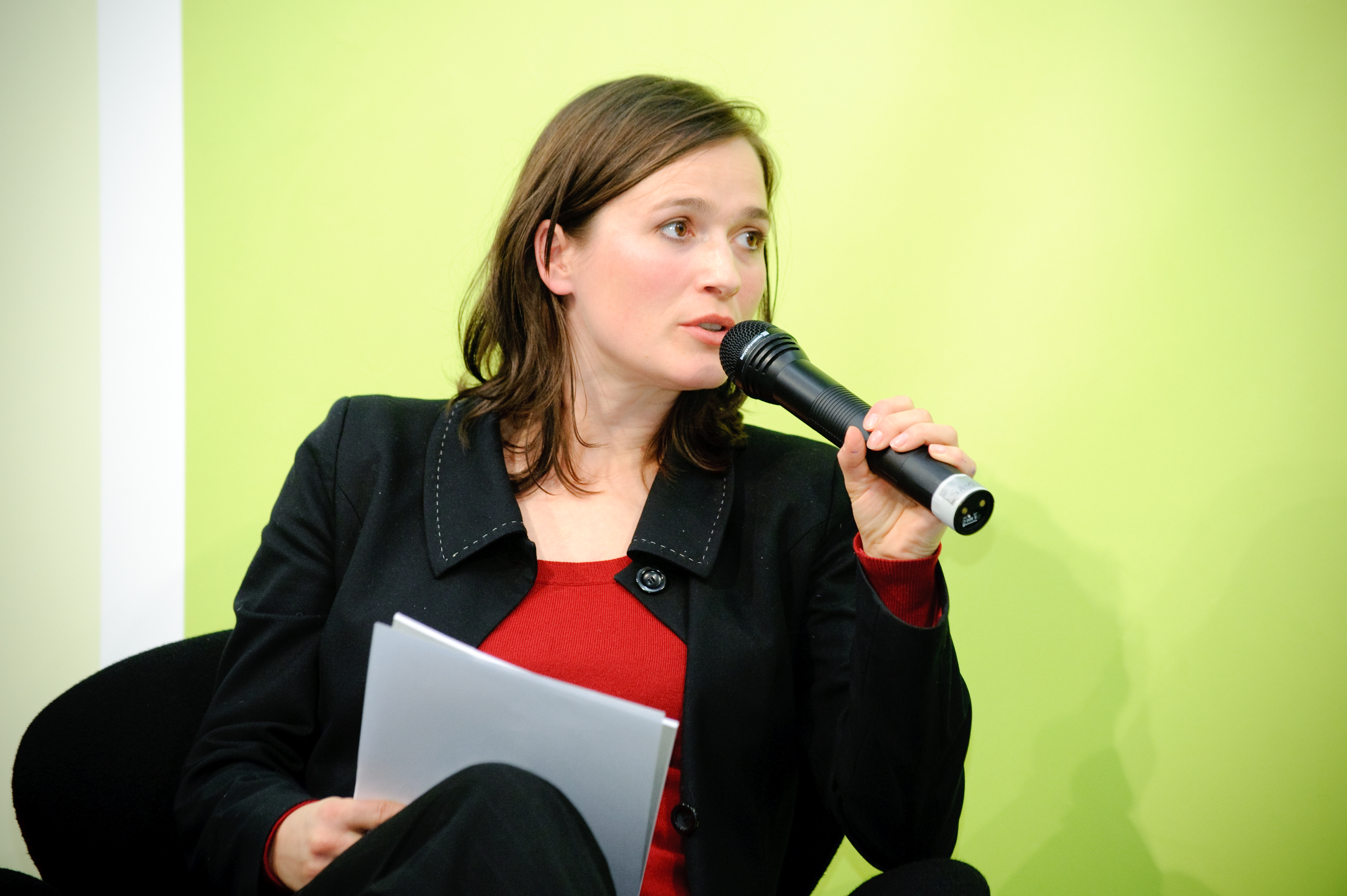 Über das Verhältnis von europäischer Integration und Demokratie, über die Auswirkungen des Lissabon-Vertrags und die Zukunft der Europäischen Union diskutieren: Prof. Dr. Ulrich K. Preuß (Rechtswissenschaftler, Hertie School of Governance, Berlin) Dr. Michaele Schreyer (Mitglied der Europäischen Kommission, a.D., Berlin) Prof. Dr. Peter Graf Kielmansegg (Politikwissenschaftler, Universität Mannheim) Moderation: Dr. Christine Pütz, Referentin Europäische Union in der Heinrich-Böll-Stiftung Foto: Stephan Röhl